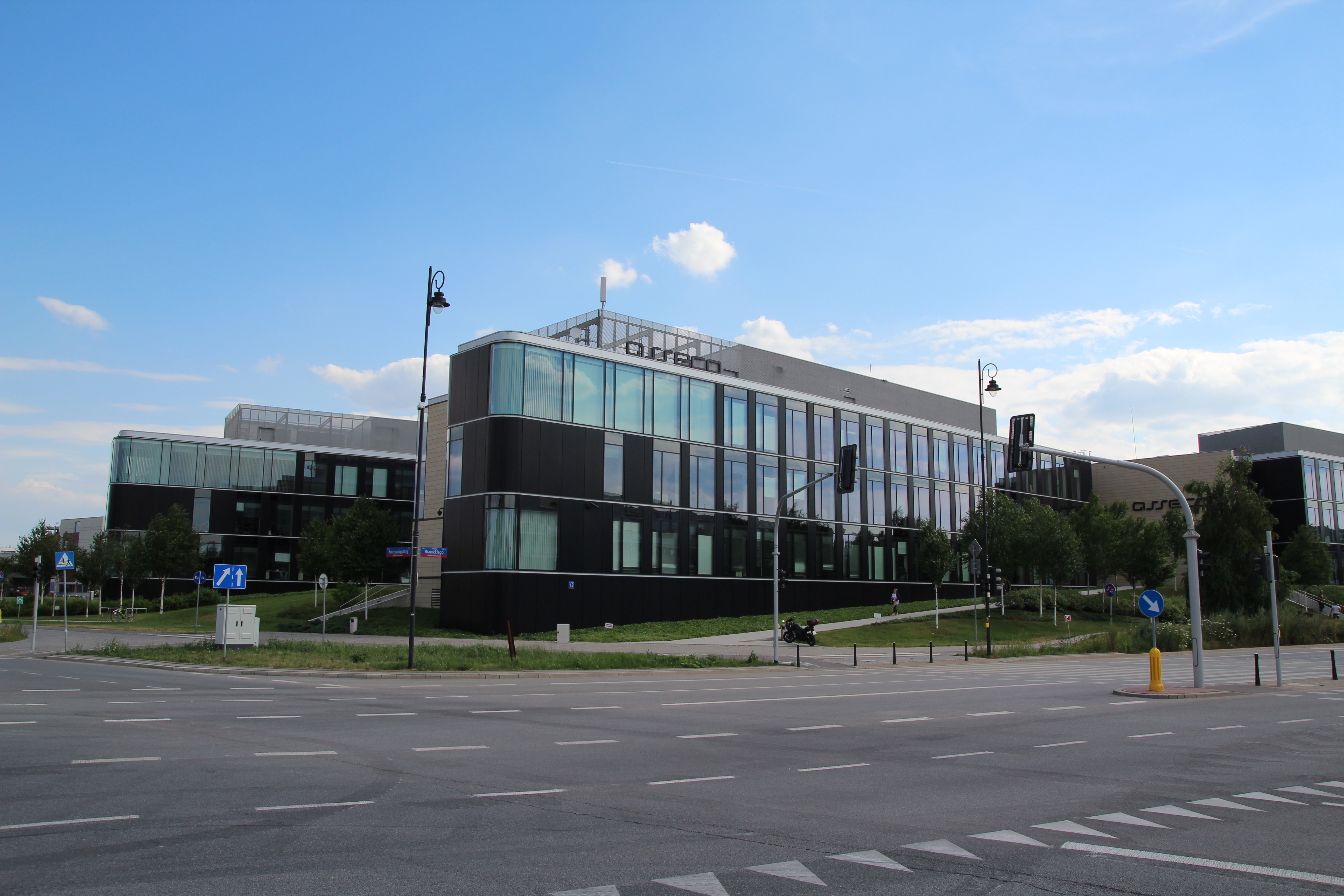 Branickiego, Rzeczypospolitej, Assecco headquarters